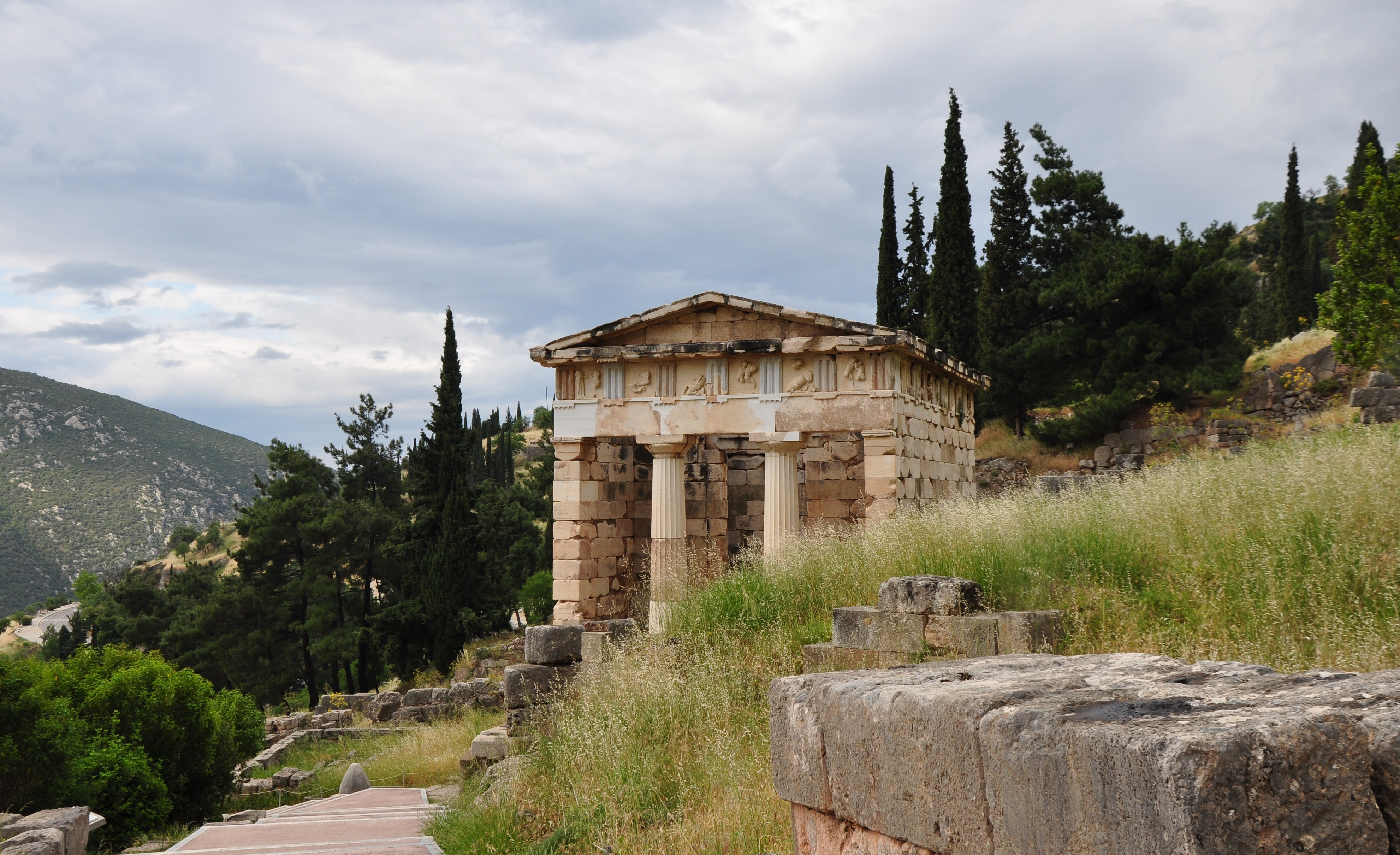 Athenian treasury, Delphi. / Athens skattkammare i Delfi.